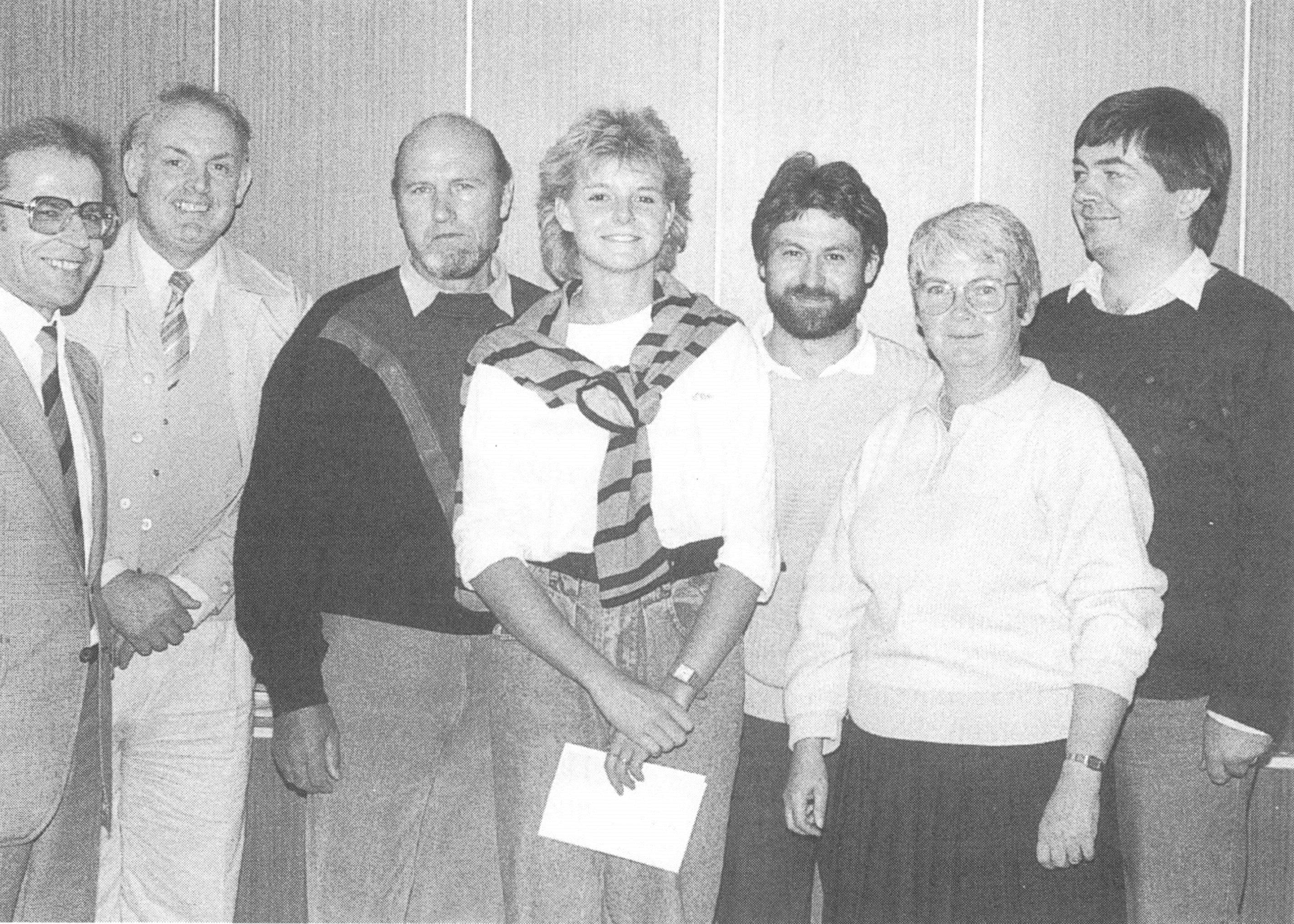 KSTBB: Mit Anja Fichtel freut sich die Lehrerschaft über die fechtsportlichen Erfolge im Schuljahr 1985-1986, an der Kaufmännischen Schule Tauberbischofsheim